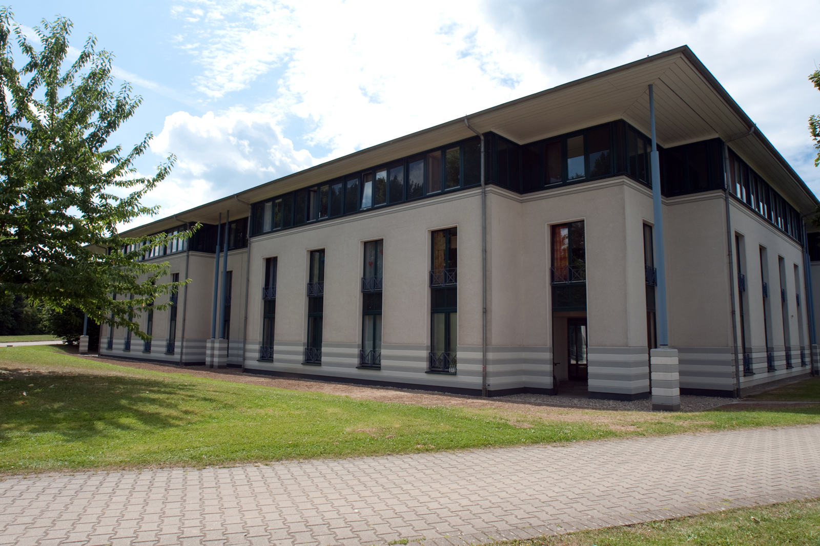 Studentenwohnheim des Studentenwerks an der Heinrich-Heine-Universität Düsseldorf